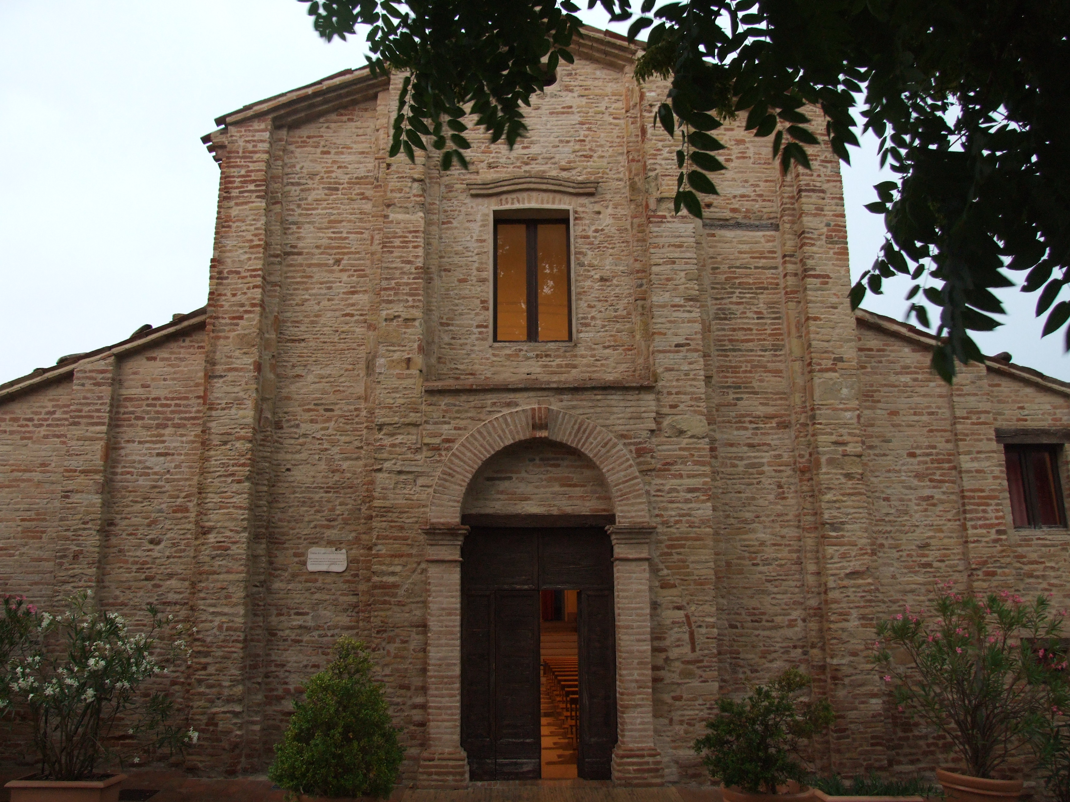 Abbazia di S. Gervasio This is a photo of a monument which is part of cultural heritage of Italy.